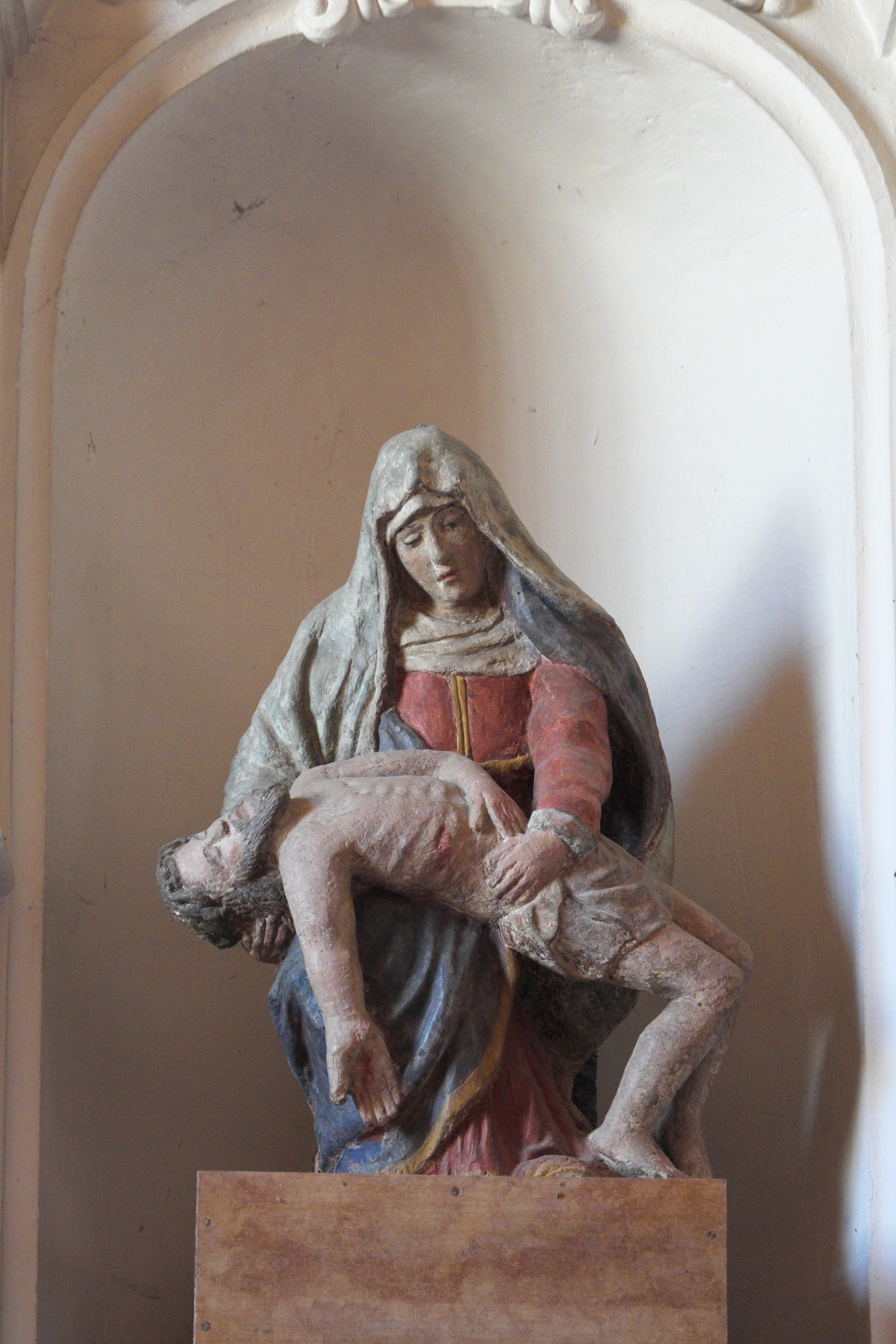 Katholische Pfarrkirche Saint-Martin in Auxey-Duresses im Département Côte-d’Or (Bourgogne-Franche-Comté/Frankreich), Pietà aus dem 16./17. Jahrhundert